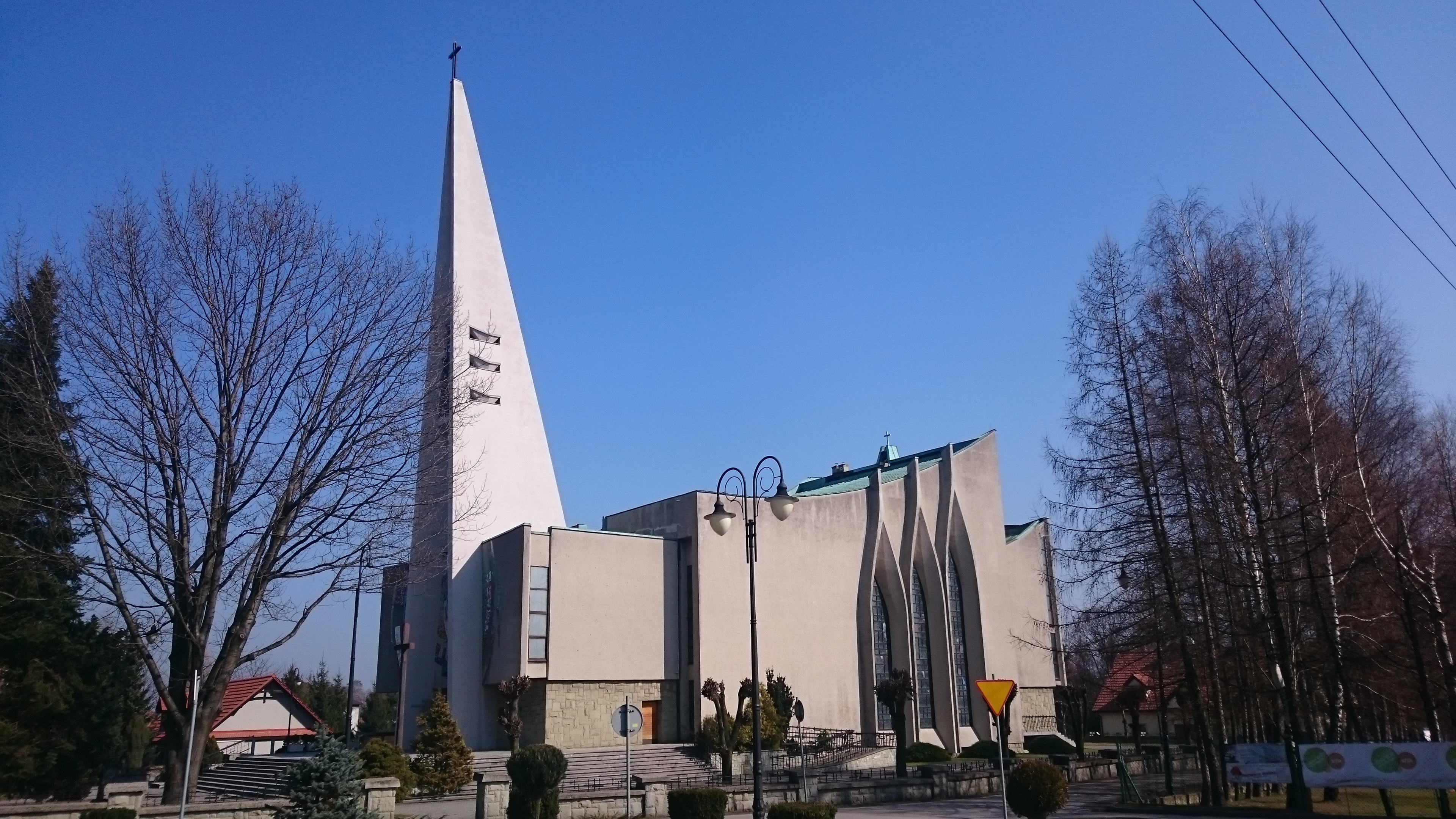 Pisarzowice, kościół św. Marcina